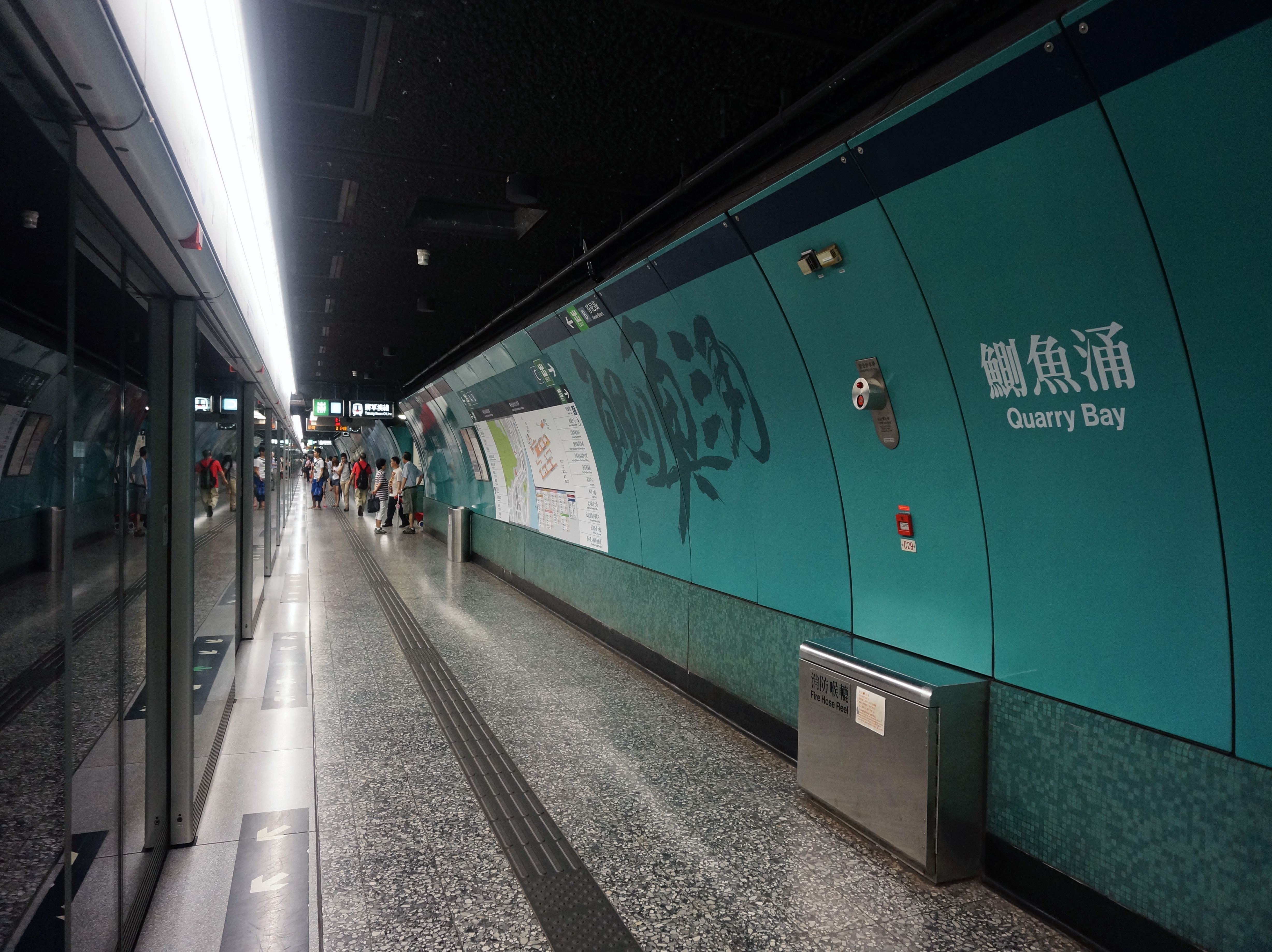 港鐵鰂魚涌站港島線月台